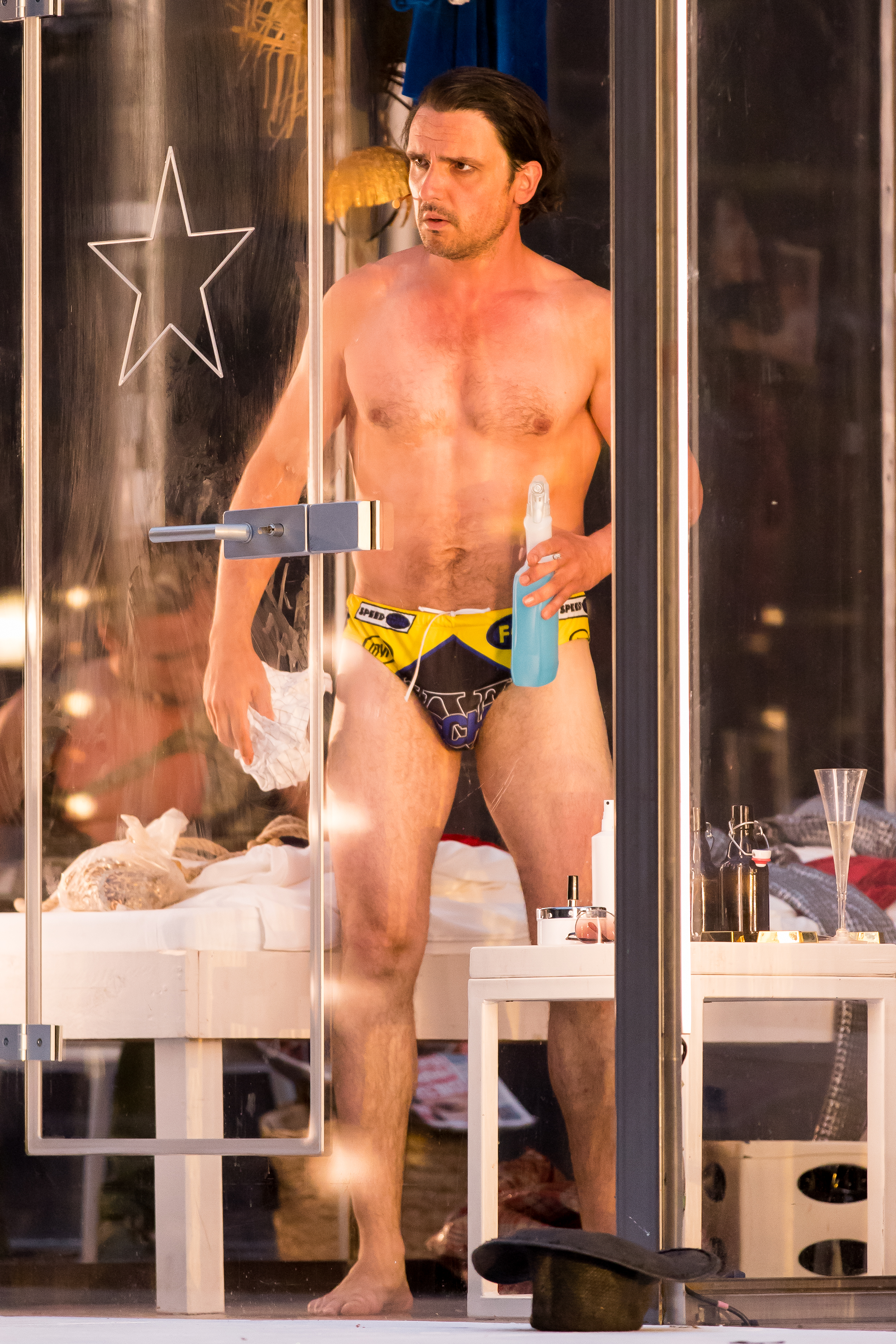 2016: Uraufführung: "GOLD. Der Film der Nibelungen" Regie: Nuran David Calis Autor: Albert Ostermaier Intendant: Nico Hofmann --- Ensemble: Produzent Konstantin Trauer: Uwe Ochsenknecht Regisseur Arsenij Kubik: Vladimir Burlakov Drehbuchautor Charlie P. Weide: Josef Ostendorf Society Reporter Peter Scheumer: Dominic Raacke Kamerafrau "the eye": Anna Rot Setdesignerin "set": Joy Maria Bai Assistentin des Produzenten Carmen: Alexandra Kamp Maskenbildnerin Sueyla Blume : Ayse Bosse die Ältere Kriemhild Karina Bergmann: Katja Weitzenböck die Jüngere Kriemhild Simone Gehel: Constanze Wächter die Ältere Brünhild Lotte Jünger: Michaela Steiger die Jüngere Brünhild Nathalie Aurun: Dennenesch Zoudé Siegfried Mohamad Söder: Ismail Deniz Hagen René Inner: Sascha Göpel Gunther Klaus Castel: Maximilian Laprell Bürgermeister Franz Koppoler: Heiner Lauterbach during Nibelungenfestspiele "GOLD. Der Film der Nibelungen" at Wormser Kaiserdom, Worms, Rheinland Pfalz, Germany on 2016-07-12, Photo: Sven Mandel